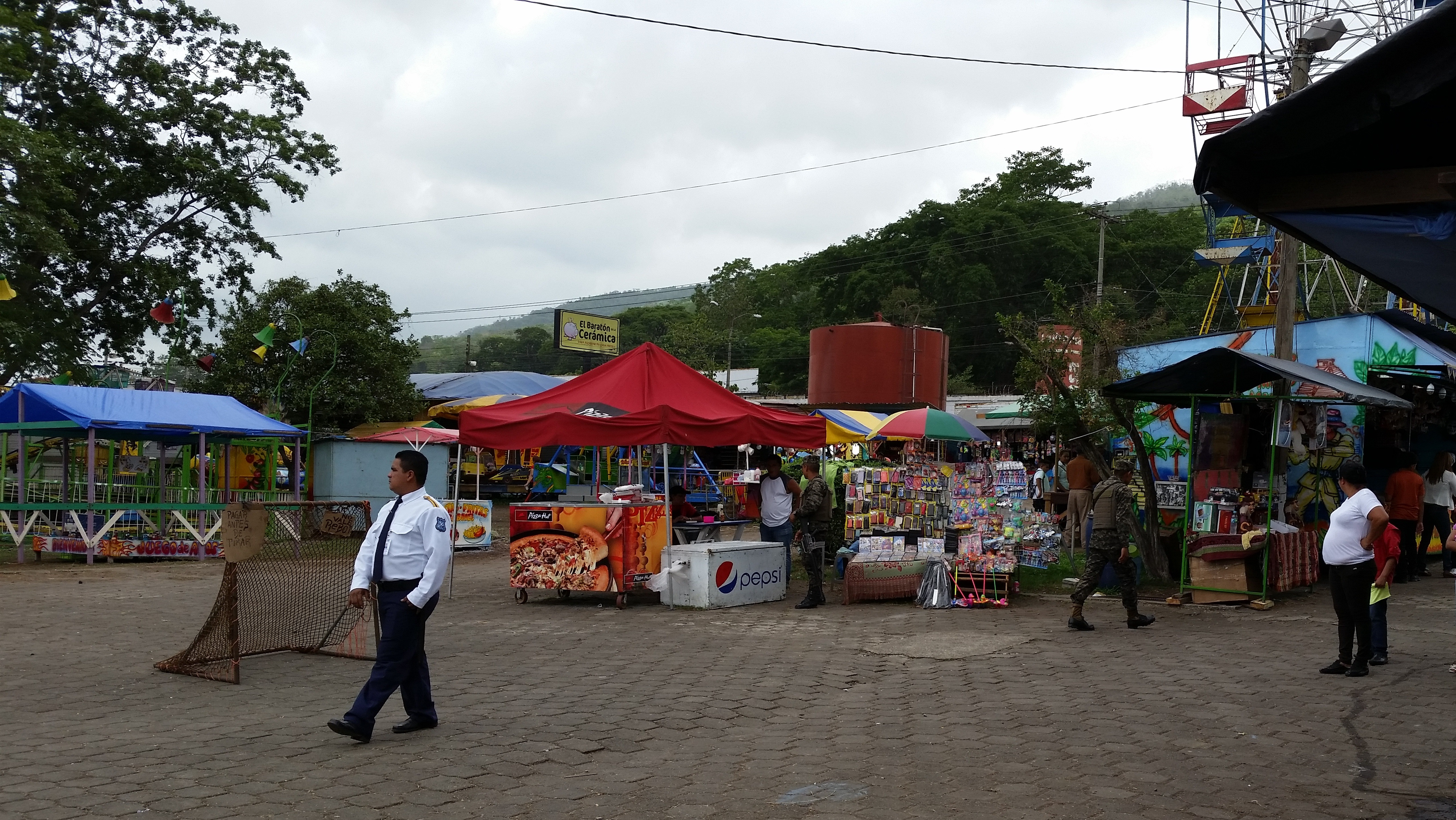 Feria de San Pedro Sula 2015